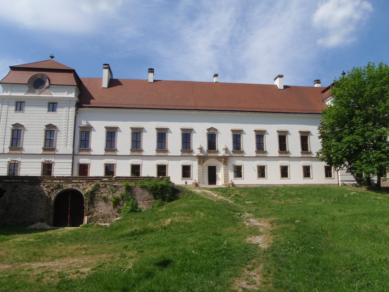 Esterházy-kastély Pápa